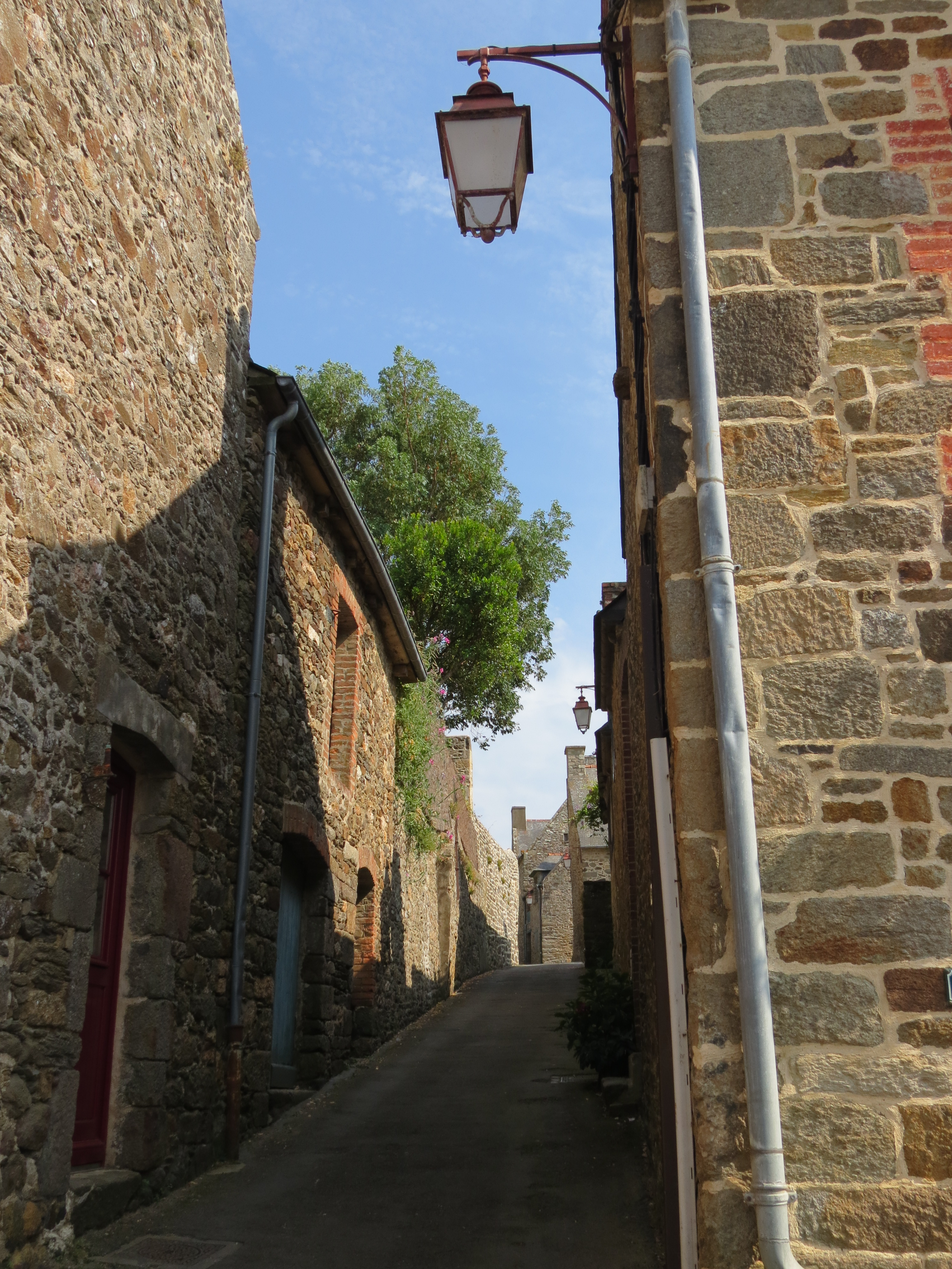 Vue d'une rue de Saint-Suliac (Bretagne, France).